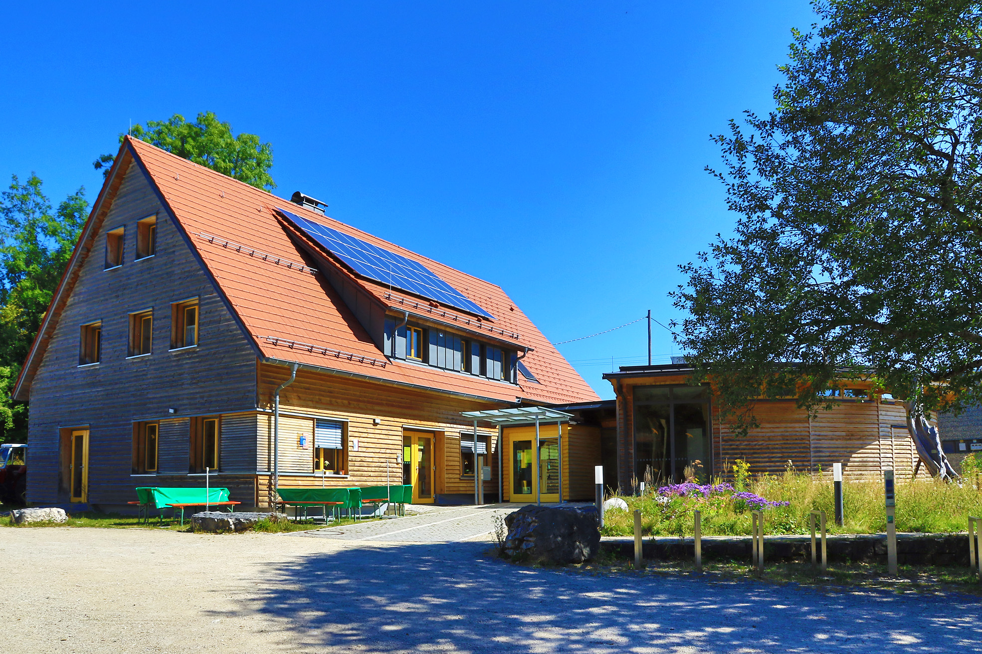 Bild des Naturschutzzentrums Schopflocher Alb